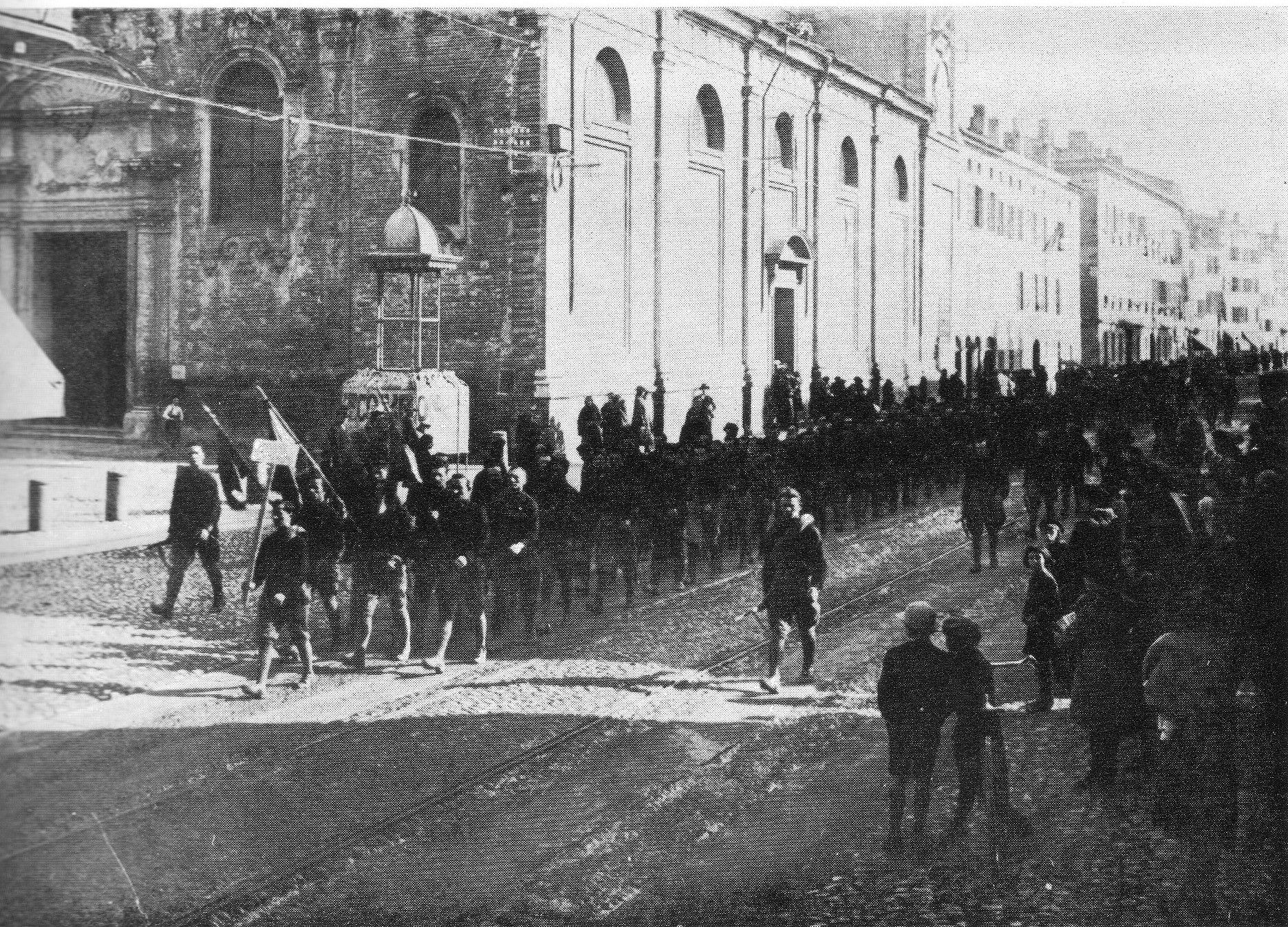 Squadre in transito per Parma in occasione delle barricate di Parma